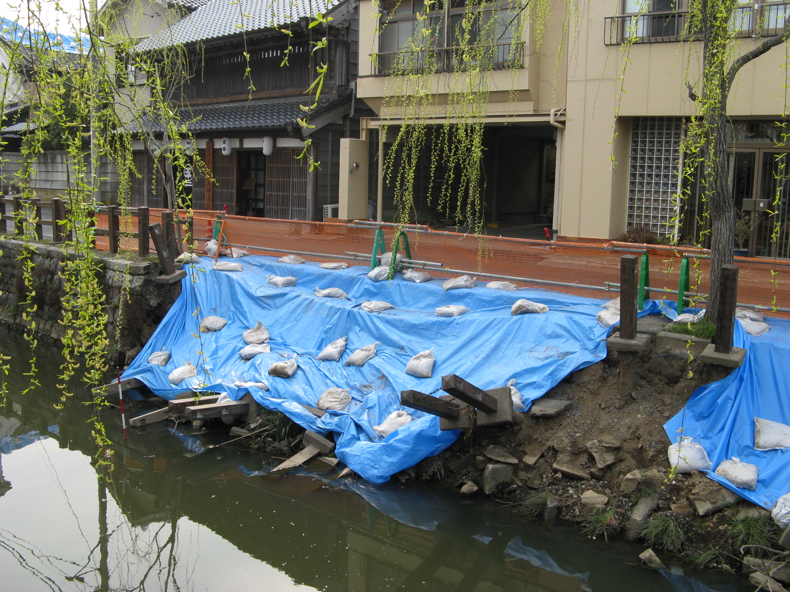 東日本大震災により崩れた小野川の川岸（千葉県香取市）